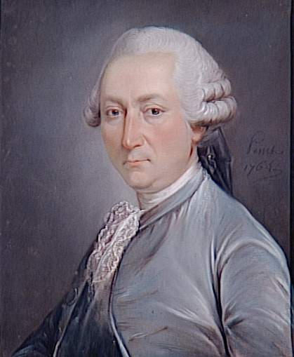 French engineer Jean-Rodolphe Perronet (1708-1794)